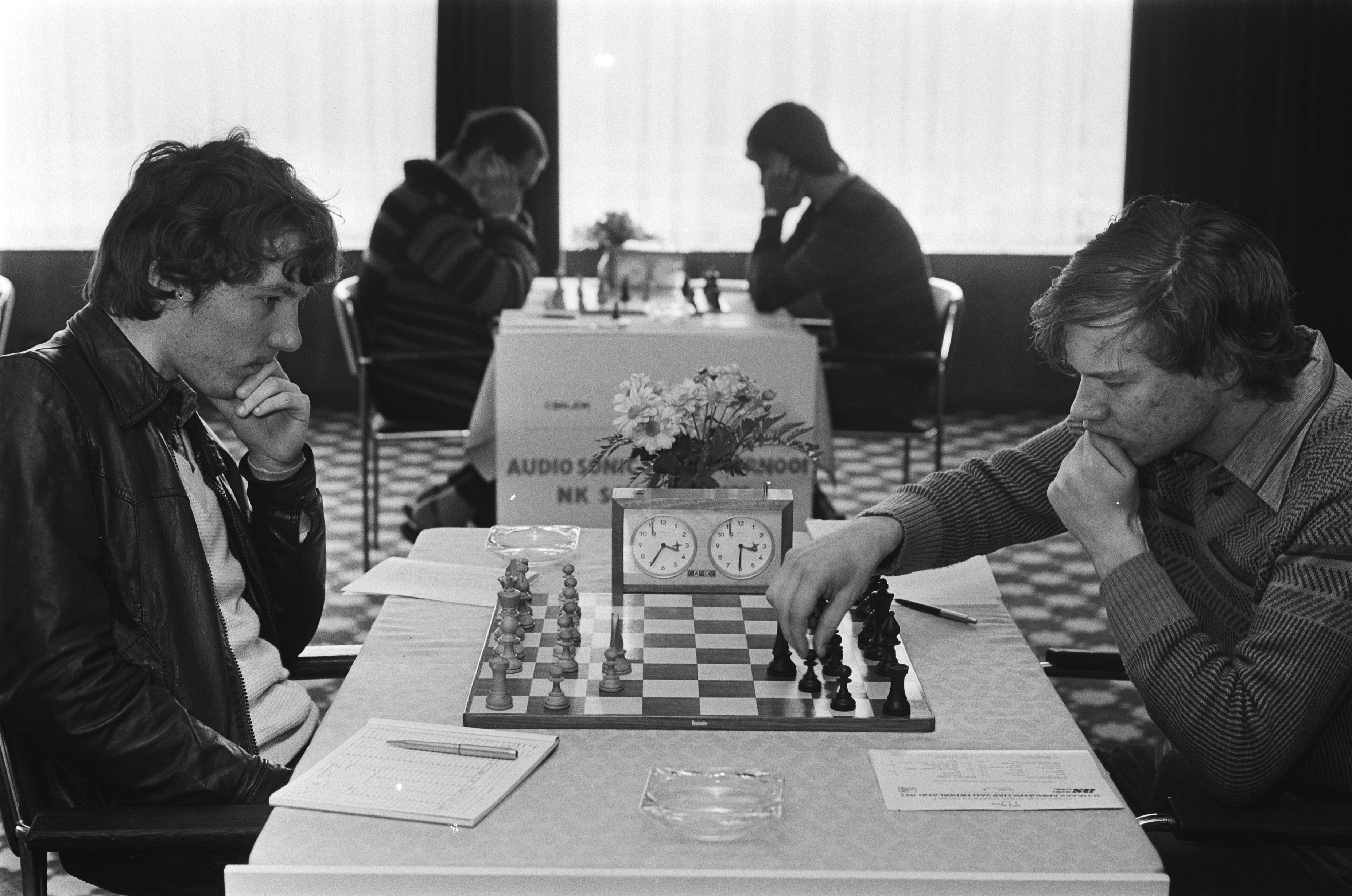 Collectie / Archief : Fotocollectie Anefo Reportage / Serie : [ onbekend ] Beschrijving : Nederlandse kampioenschappen Schaken in Amsterdam. De broers Rini en Hans Kuyf tegen elkaar Datum : 15 maart 1982 Locatie : Amsterdam, Noord-Holland Trefwoorden : KAMPIOENSCHAPPEN, SCHAKEN Fotograaf : Croes, Rob C. / Anefo Auteursrechthebbende : Nationaal Archief Materiaalsoort : Negatief (zwart/wit) Nummer archiefinventaris : bekijk toegang 2.24.01.05 Bestanddeelnummer : 932-0420